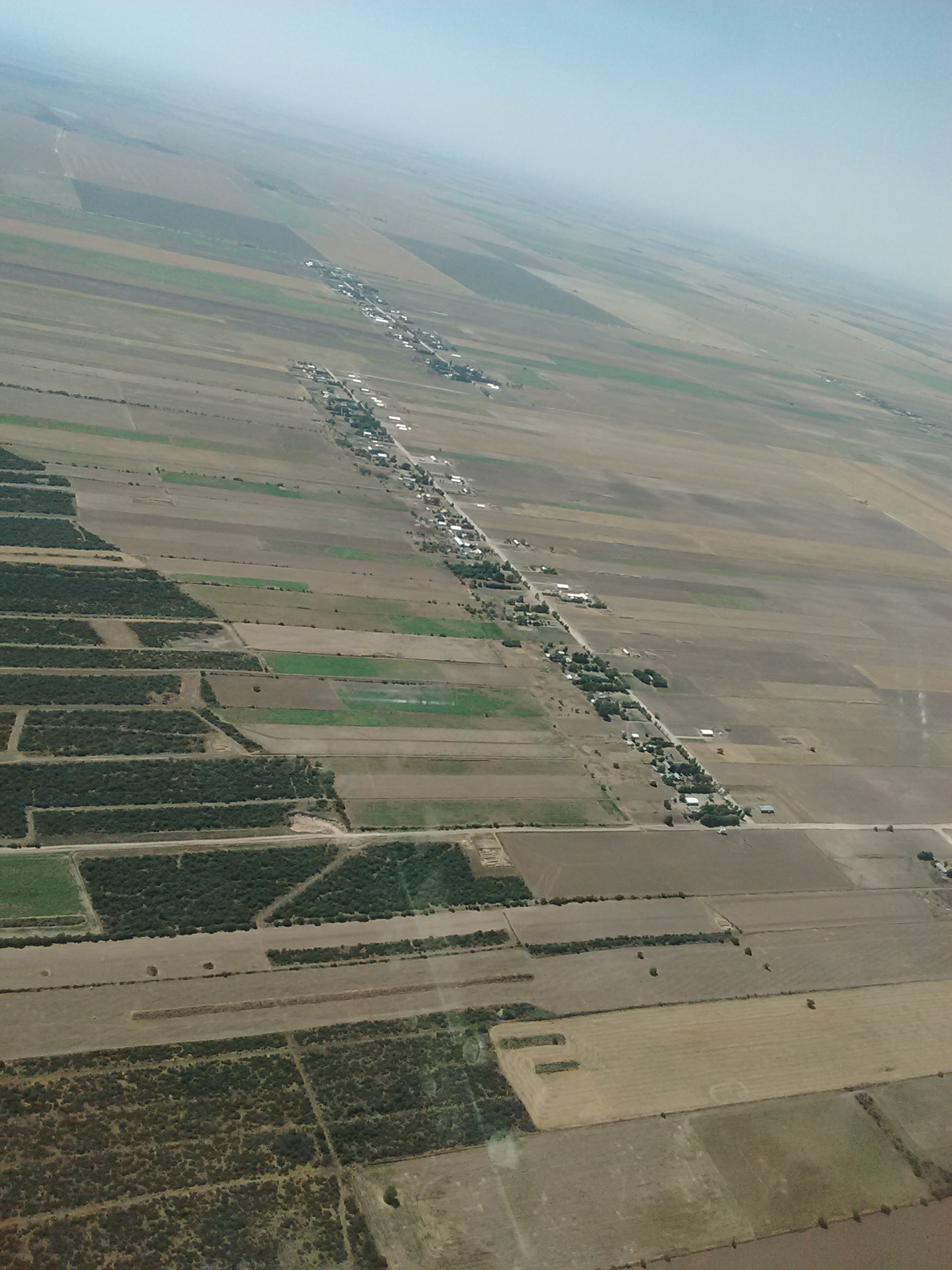 Vista aerea de la Colonia Nueva Esperanza. En Remecó, Guatraché, provincia de La Pampa, Argentina